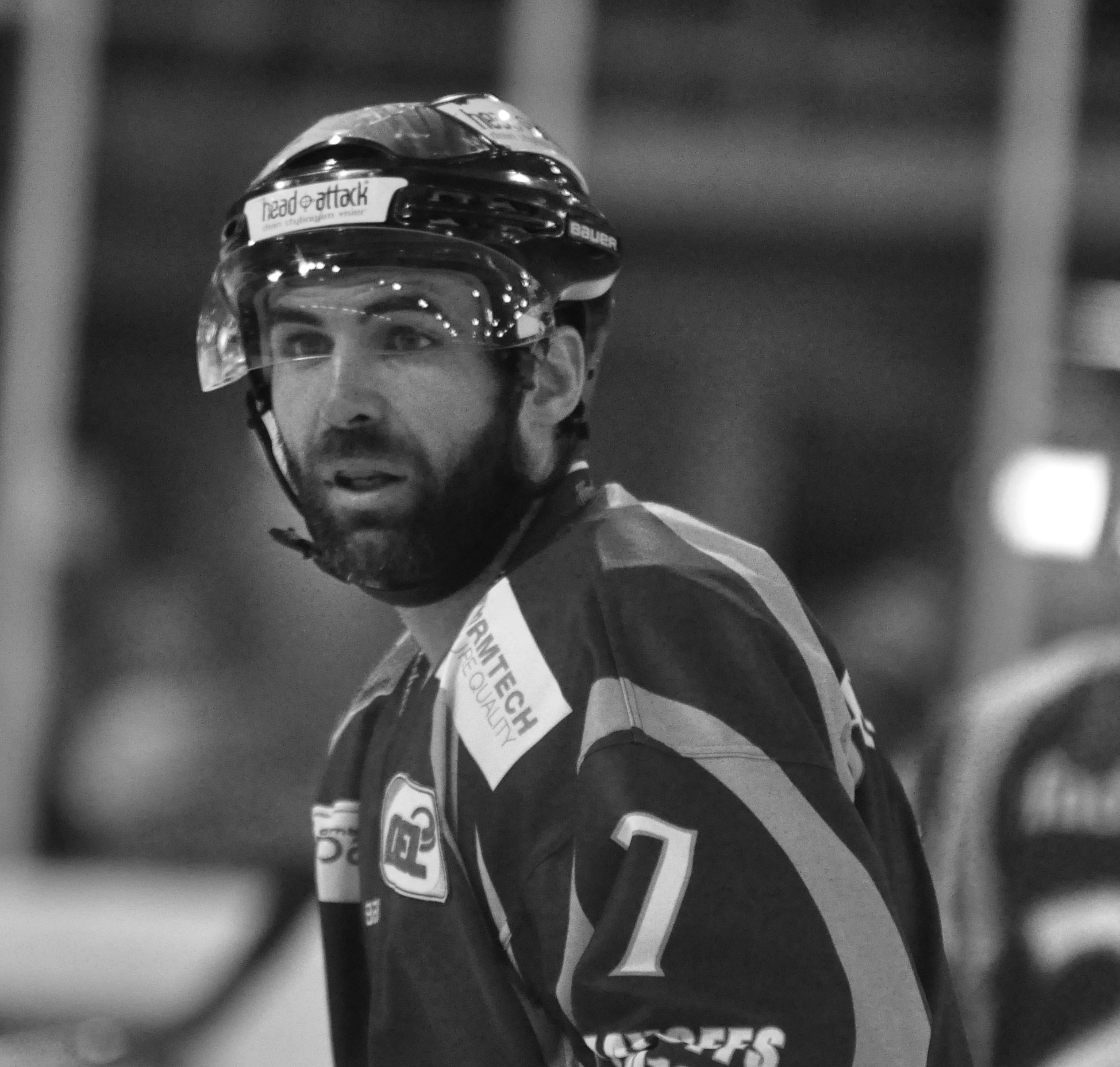 Straubing Tigers - Eisbären Berlin 07.04.2012 DEL PlayOff Halbfinale